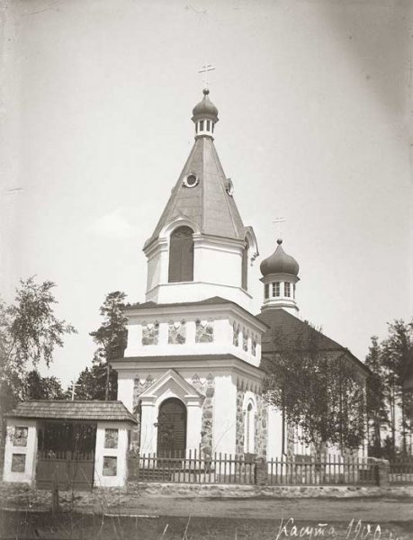 Беларуская (тарашкевіца): Касута (Kasuta). Царква-мураўёўка Сьвятых Апосталаў Пятра і Паўла